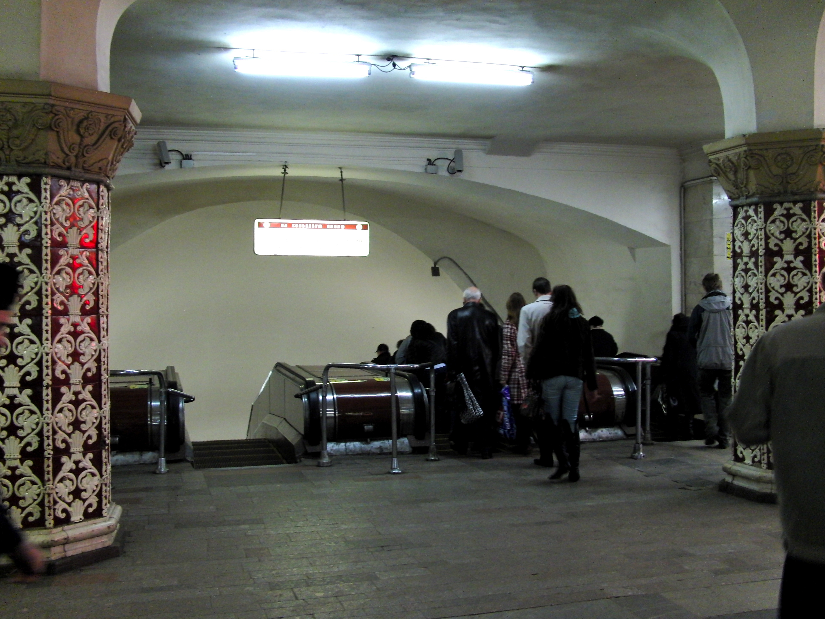 Escalators between Komsomolskaya-koltsevaya and Komsomolskaya-radialnaya stations (Эскалаторы между станциями Комсомольская-кольцевая и Комсомольская